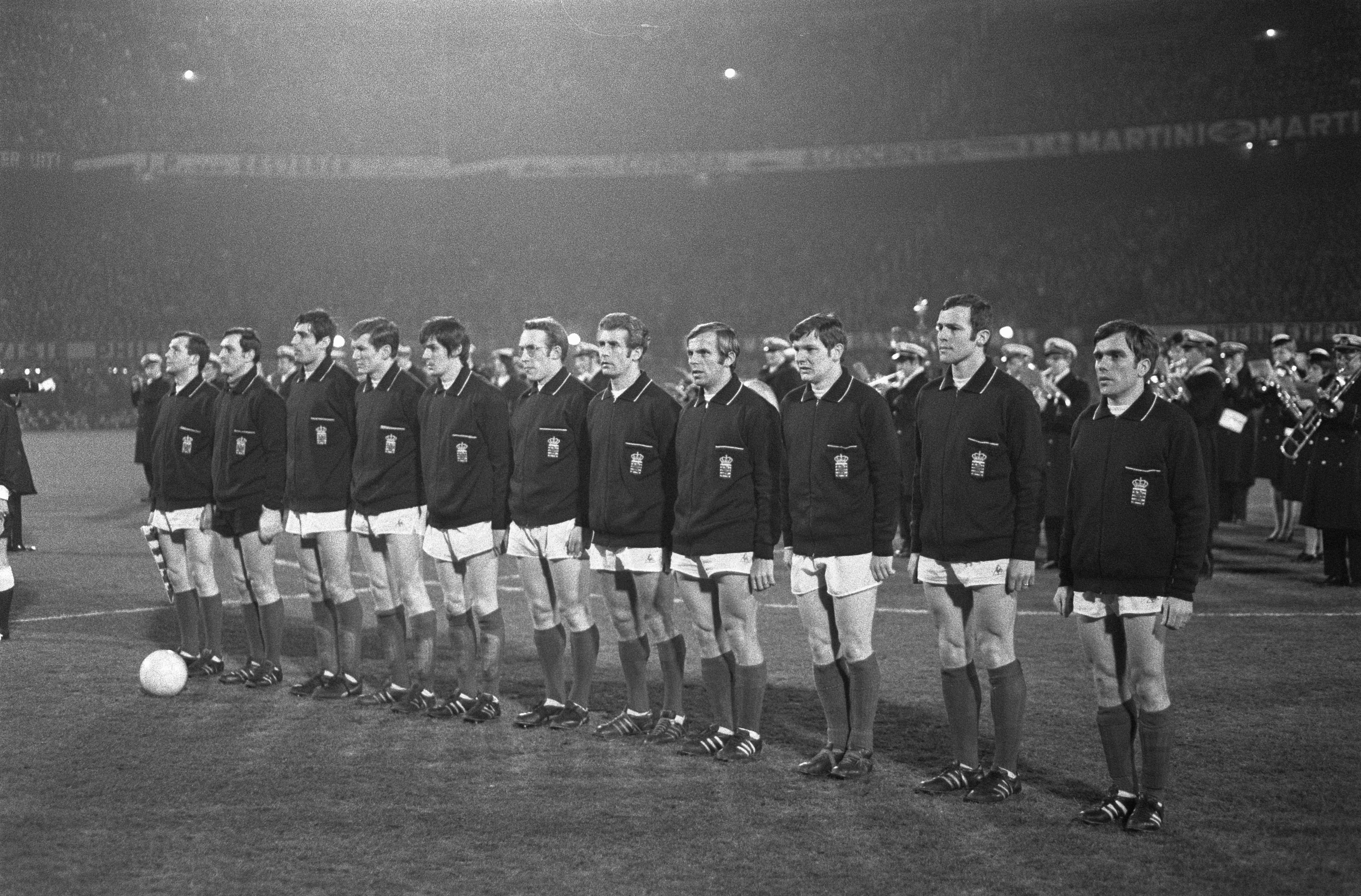 Collectie / Archief : Fotocollectie Anefo Reportage / Serie : [ onbekend ] Beschrijving : Voorronde van Wereldkampioenschap voetbal te Rotterdam, Nederland tegen Luxemburg 4-0. Elftal: René Hoffmann, Johny Hoffmann, Fernand Jeitz, Norbert Leszczynski, François Konter, Nicky Hoffmann, Louis Pilot, Jean Klein, Edy Dublin, Paul Philipp, Ady Schmit. Datum : 26 maart 1969 Locatie : Rotterdam, Zuid-Holland Trefwoorden : elftallen, sport, voetbal Fotograaf : Koch, Eric / Anefo Auteursrechthebbende : Nationaal Archief Materiaalsoort : Negatief (zwart/wit) Nummer archiefinventaris : bekijk toegang 2.24.01.05 Bestanddeelnummer : 922-2390